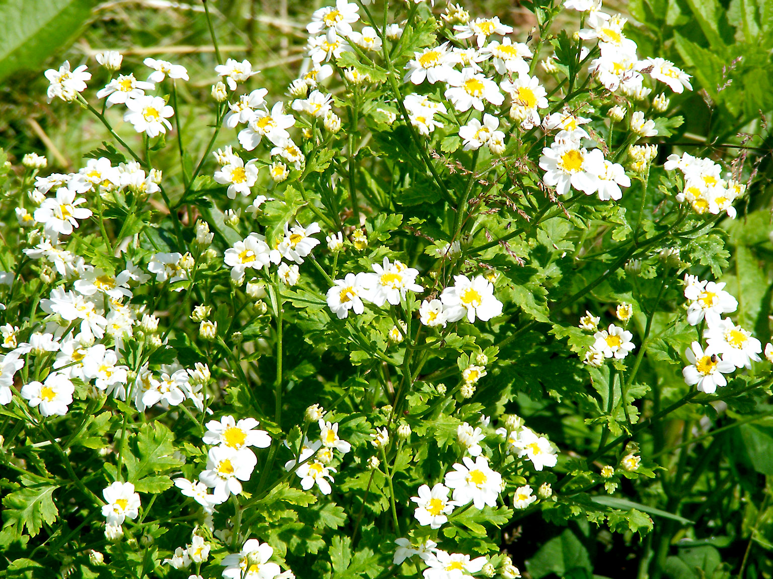 ganze Pflanze